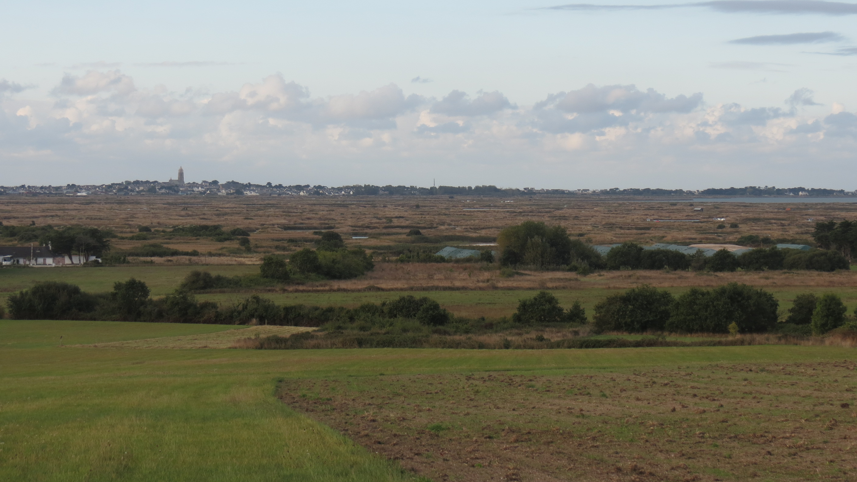 Guérande - Marais salant - Vue générale